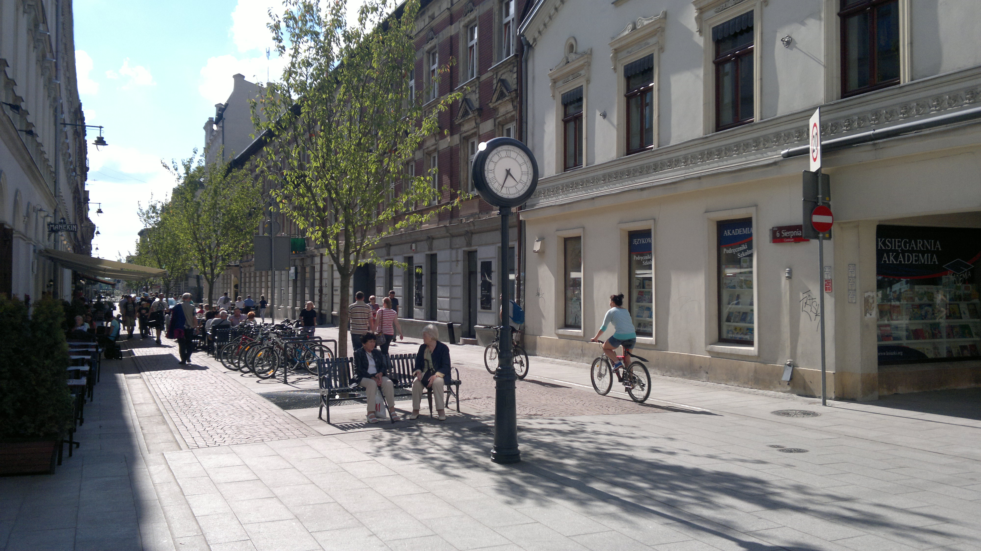 Ulica 6 Sierpnia w Łodzi. Po remoncie w 2014 roku w ramach budżetu obywatelskiego. Pierwszy w historii Łodzi woonerf.